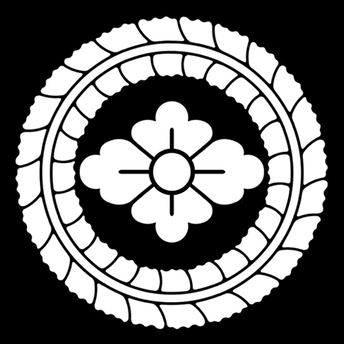 「藤輪に花菱」紋（染抜）